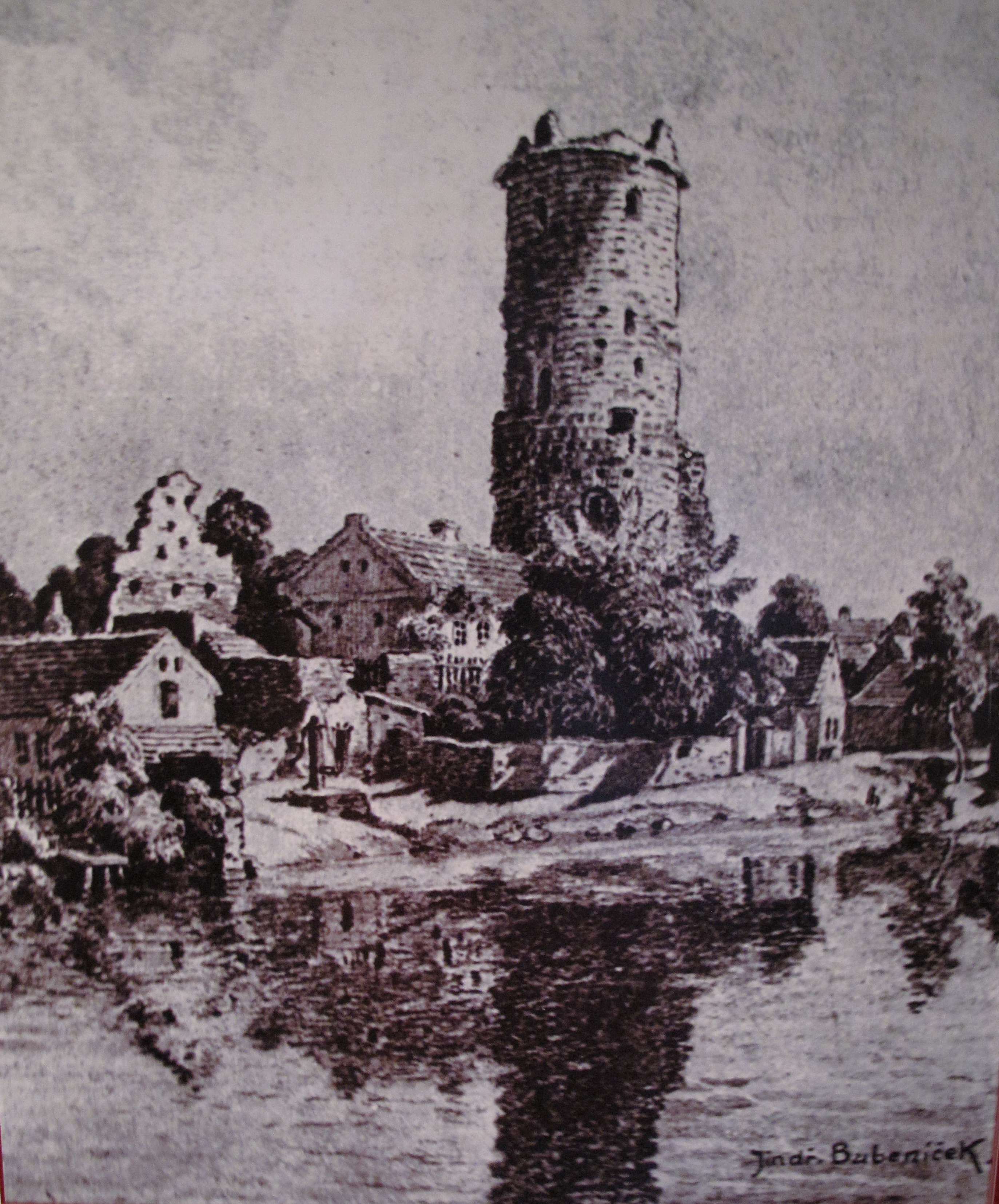 Jindřich Bubeníček, Jenštejn kolem roku 1890